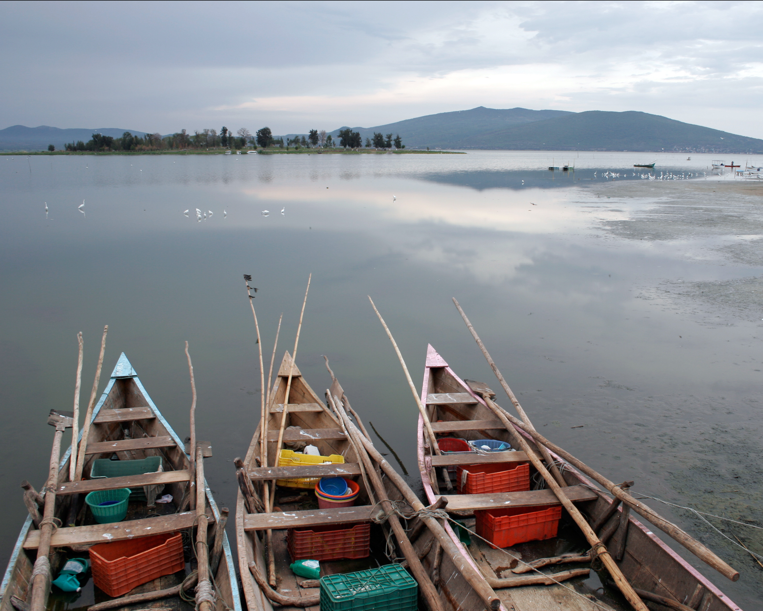 Fishing boats at , Guanajuato, Mexico - Lanchas de Pescar en el Lago de Yuriria, Guanajuato, México